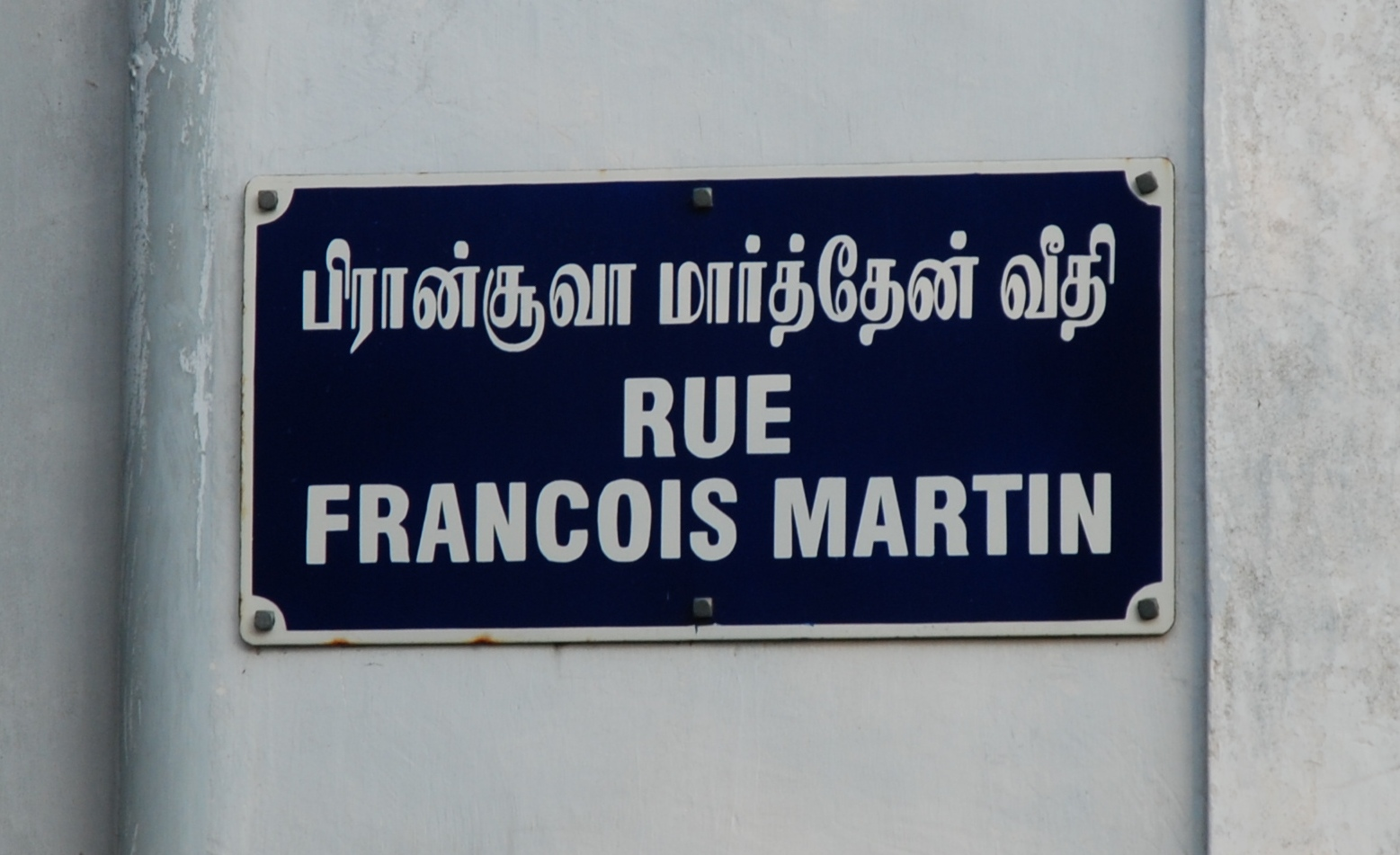 Panneau bilingue Tamoul-Français à Pondichery